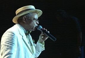 Cantor brasileiro Nei Lopes em imagem do acervo da TV Brasil.